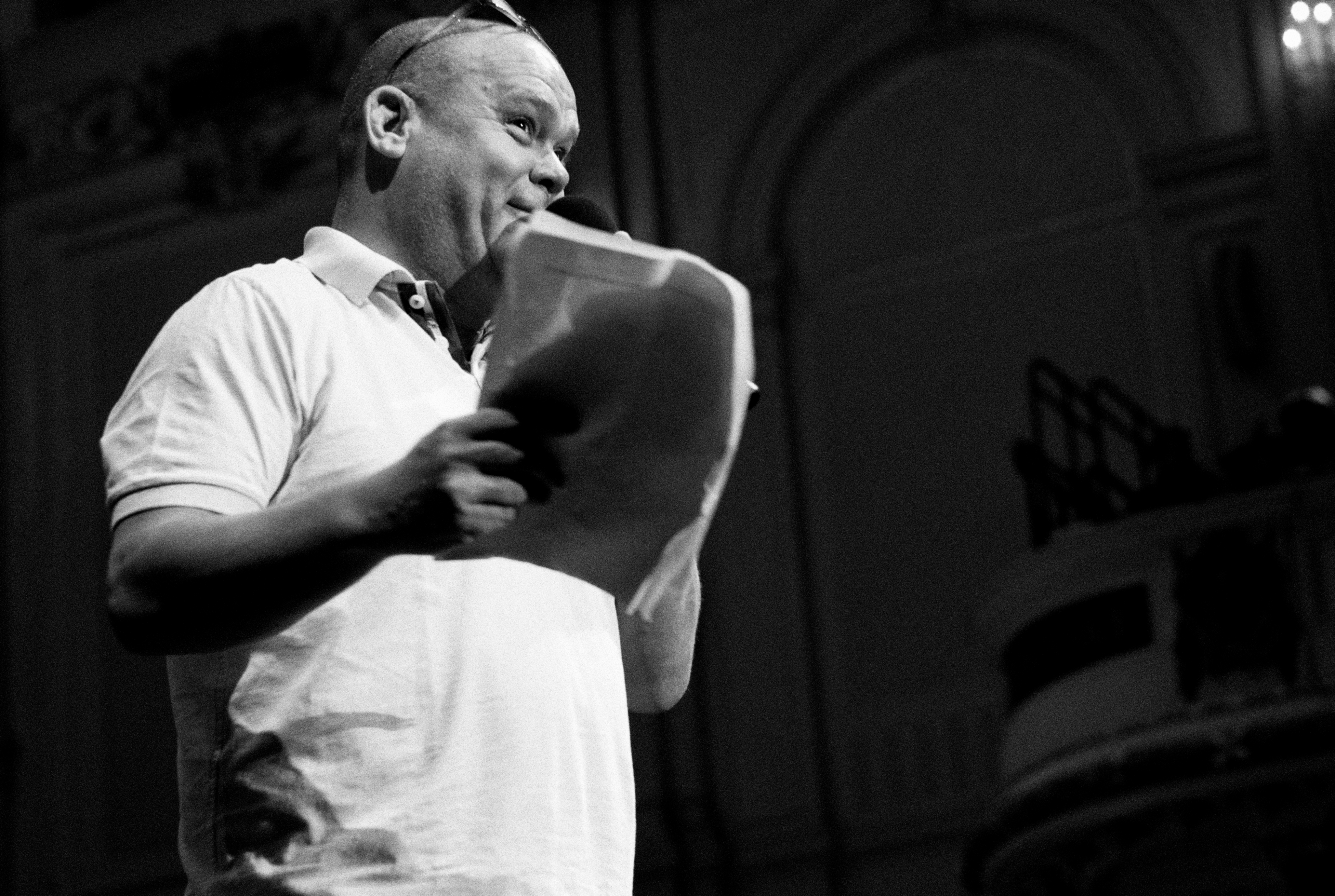 Dutch TV presenter Paul de Leeuw